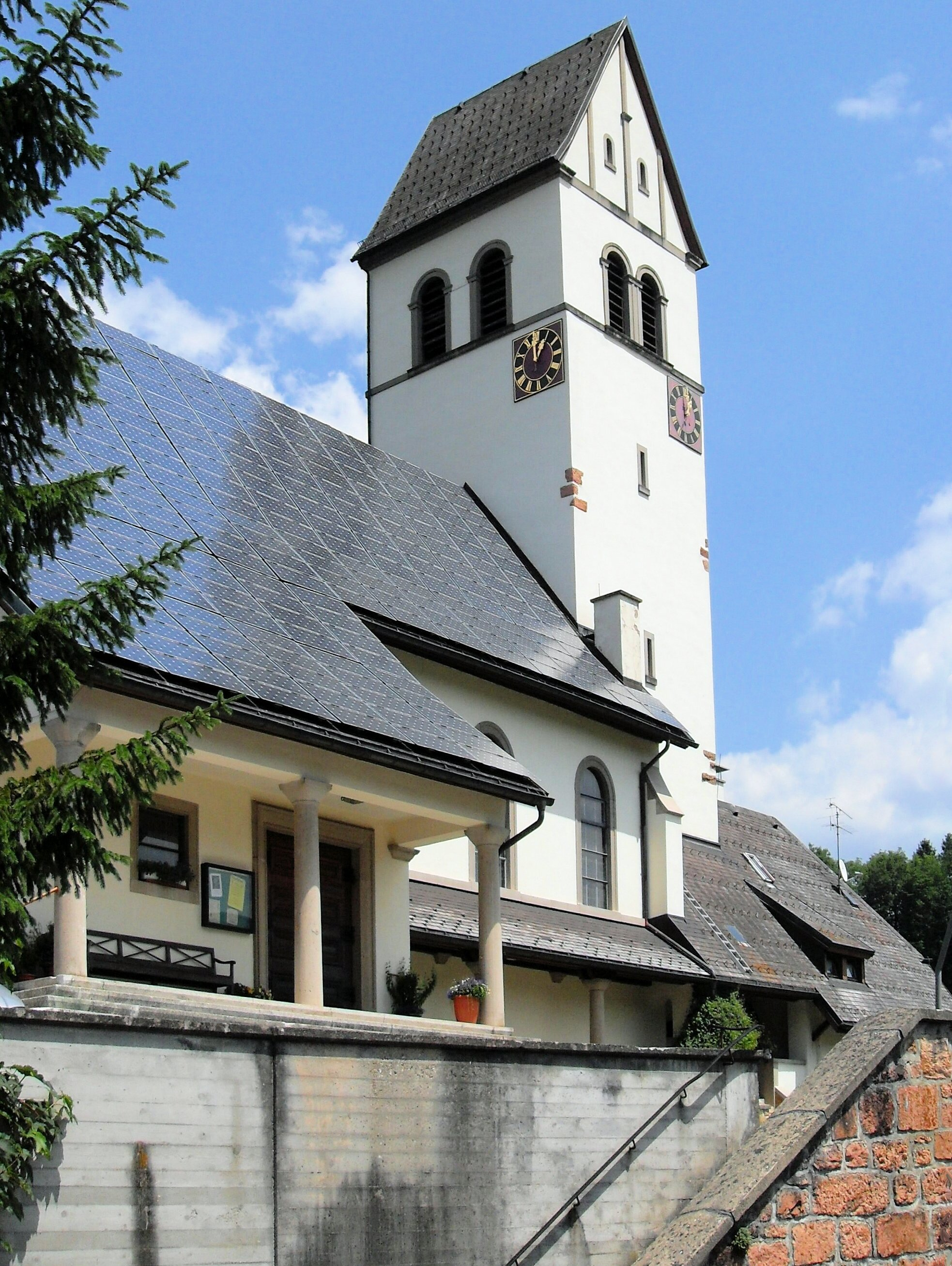 evangelische Bergkirche in Schönau im Schwarzwald, Deutschland